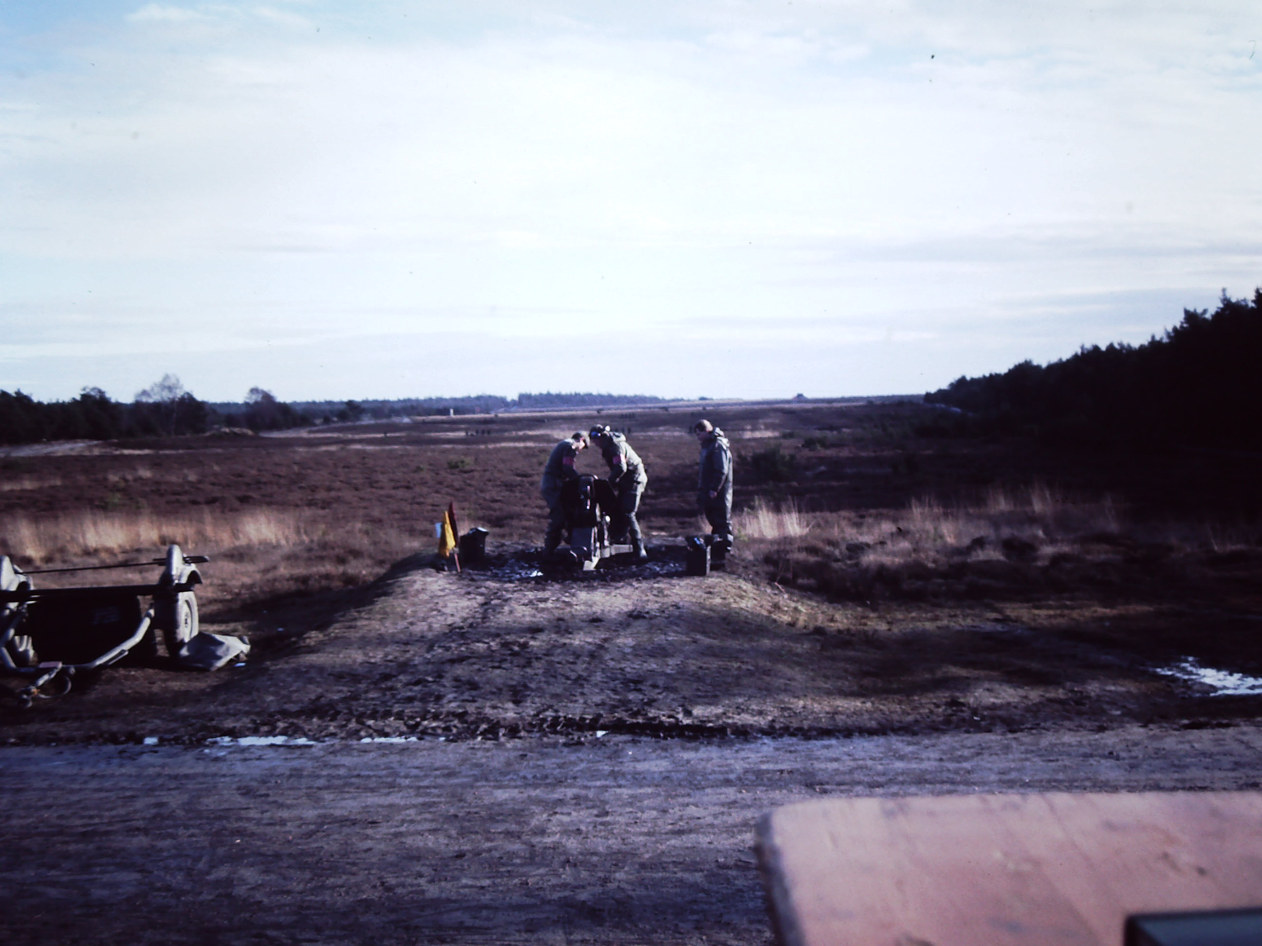 Fliegerabwehrgruppe der 1. Batterie des Raketenartilleriebataillon 122 beim Schiessen auf dem Truppenübungsplatz Munster